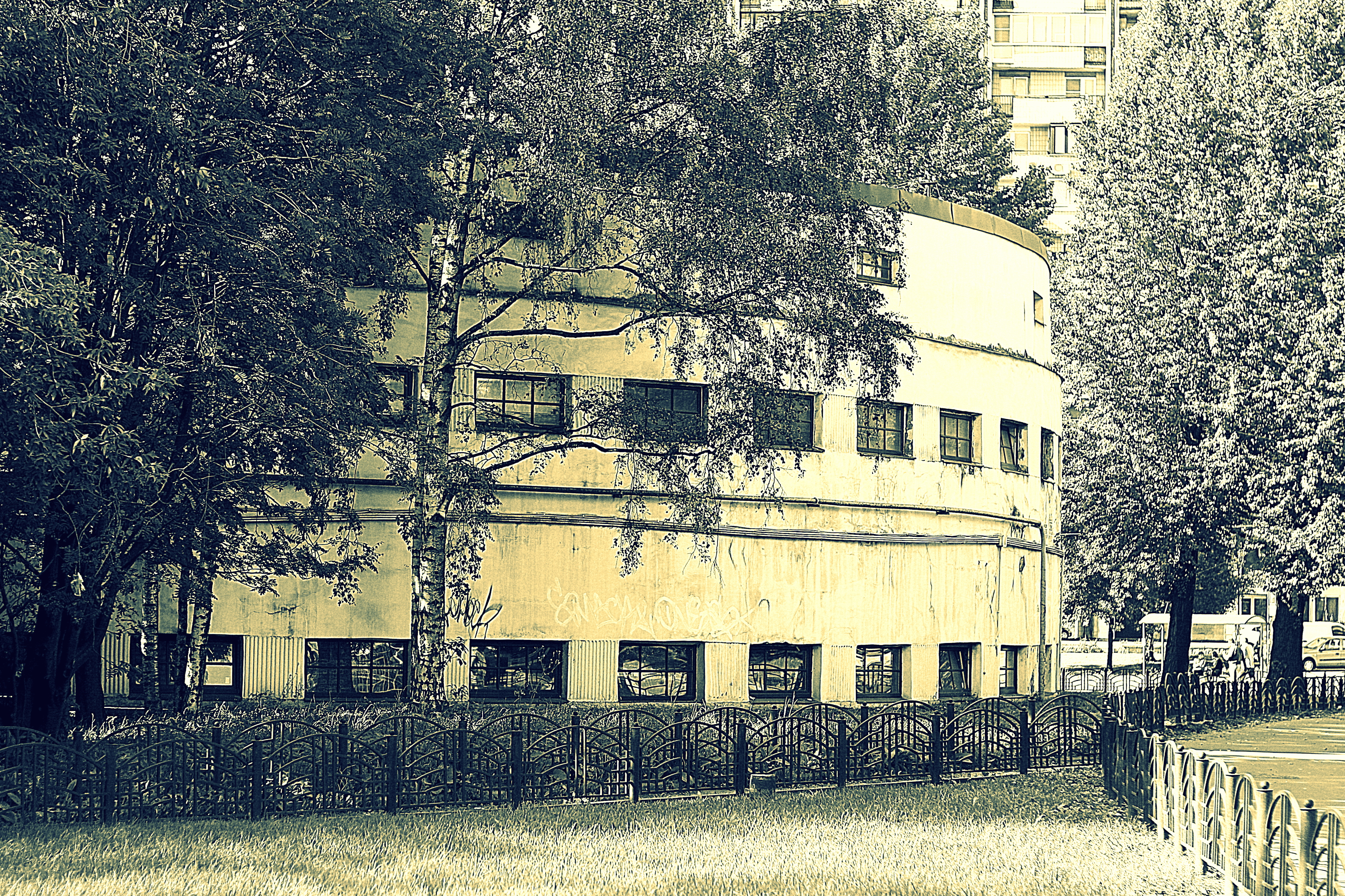 Здание круглой бани (Санкт-Петербург и Лен.область, Санкт-Петербург, Карбышева улица, 29-а)